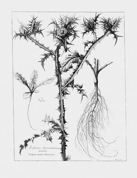 planche d'un ouvrage de l'Académie royale des sciences, publiée en 1676.